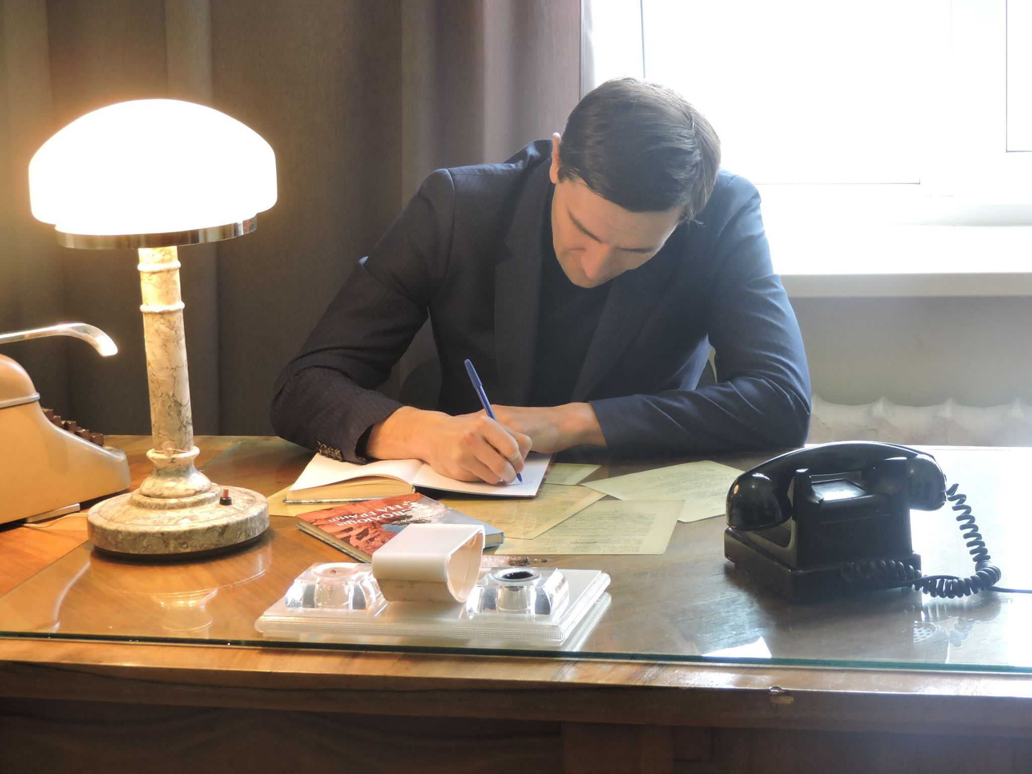 Сергій Сіваченко у Музейній кімнаті Василя Симоненка підчас нагородження літературною премією його імені у Черкасах (2018)